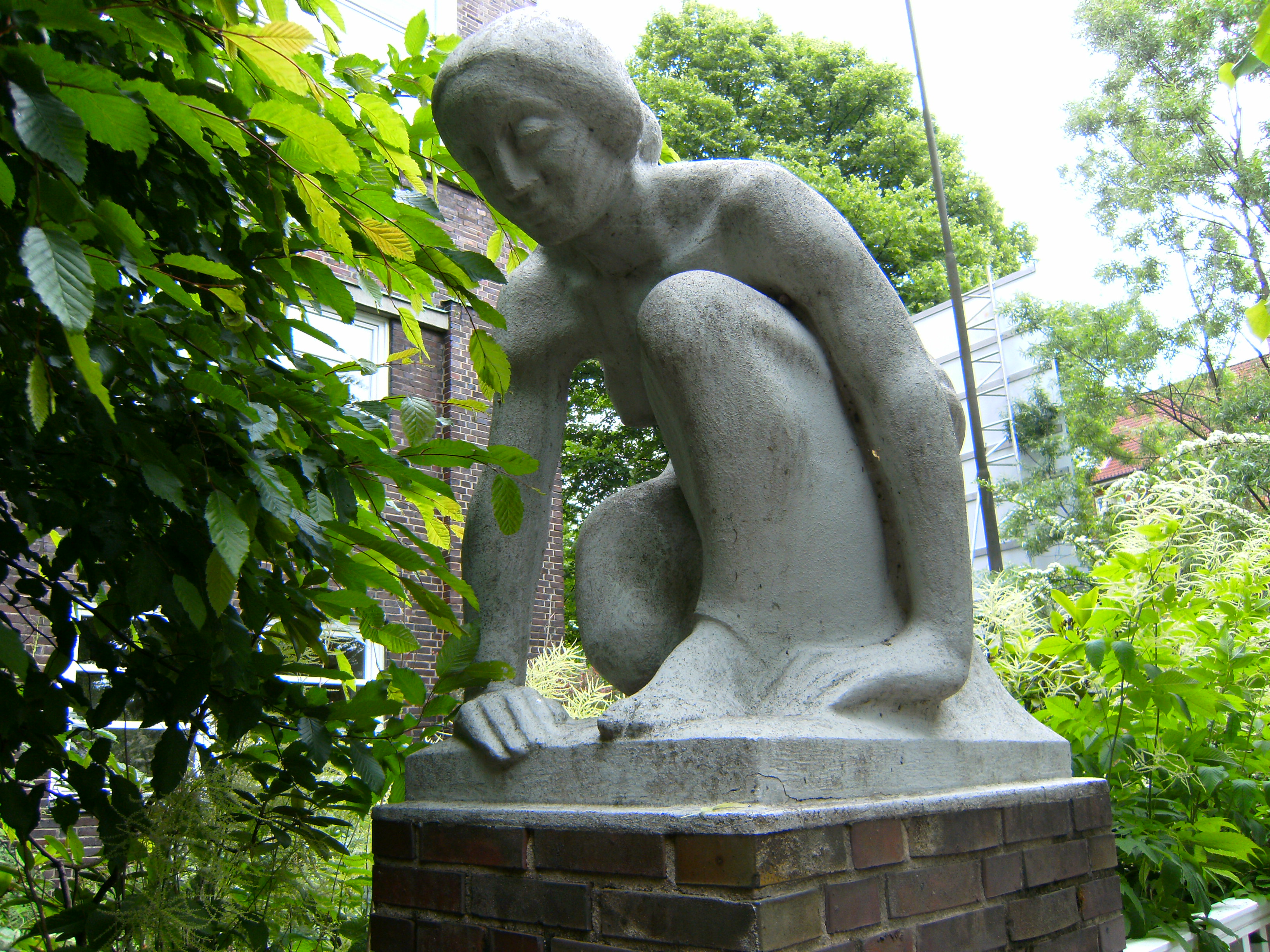 Skulptur "Die Startende" von Friedrich Wield in Hamburg Uferstraße/Ecke Wagnerstraße, Berufliche Schule Uferstraße.